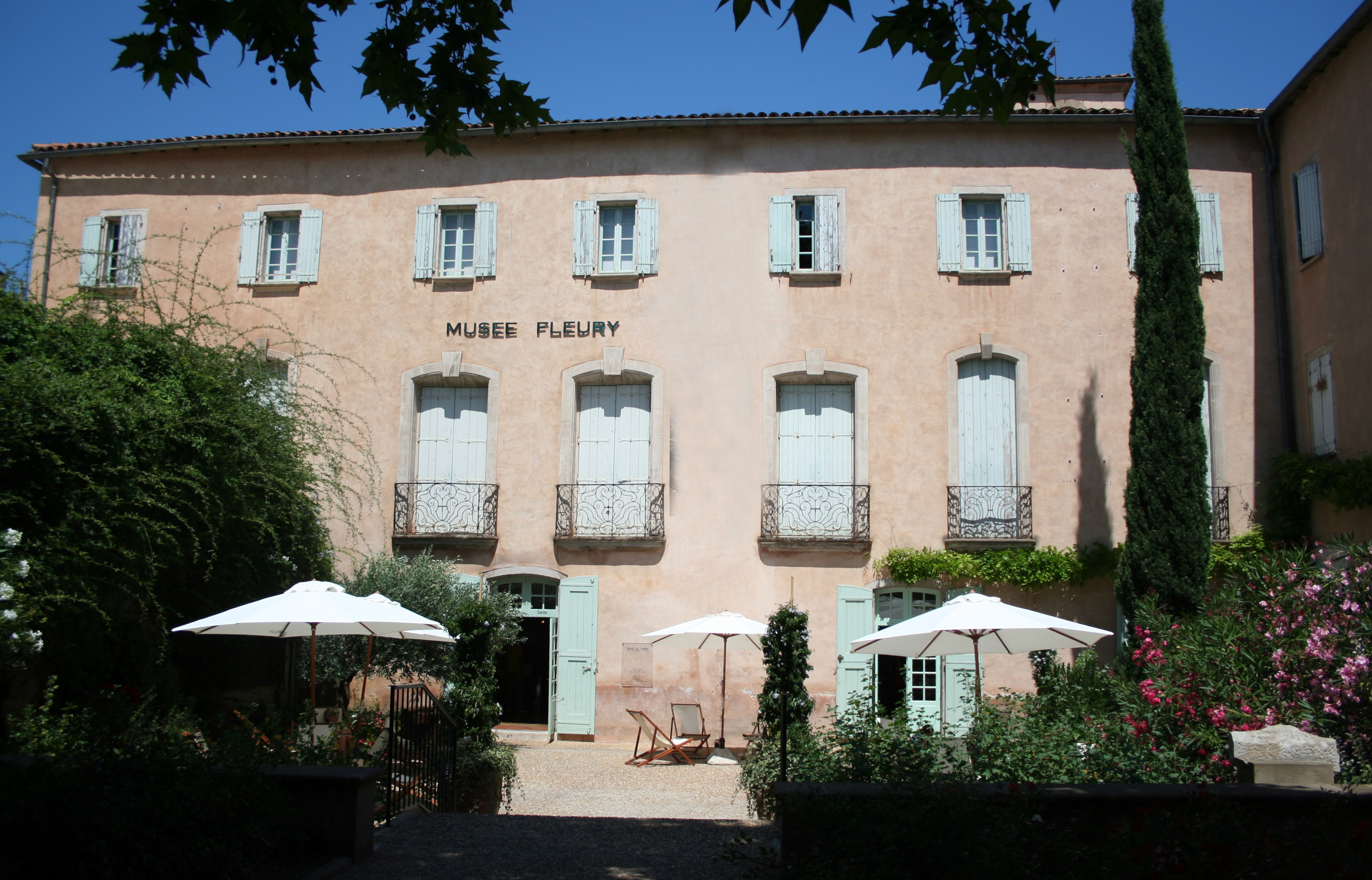 Lodève (Hérault) - Musée Fleury (ancien hôtel du Cardinal de Fleury)